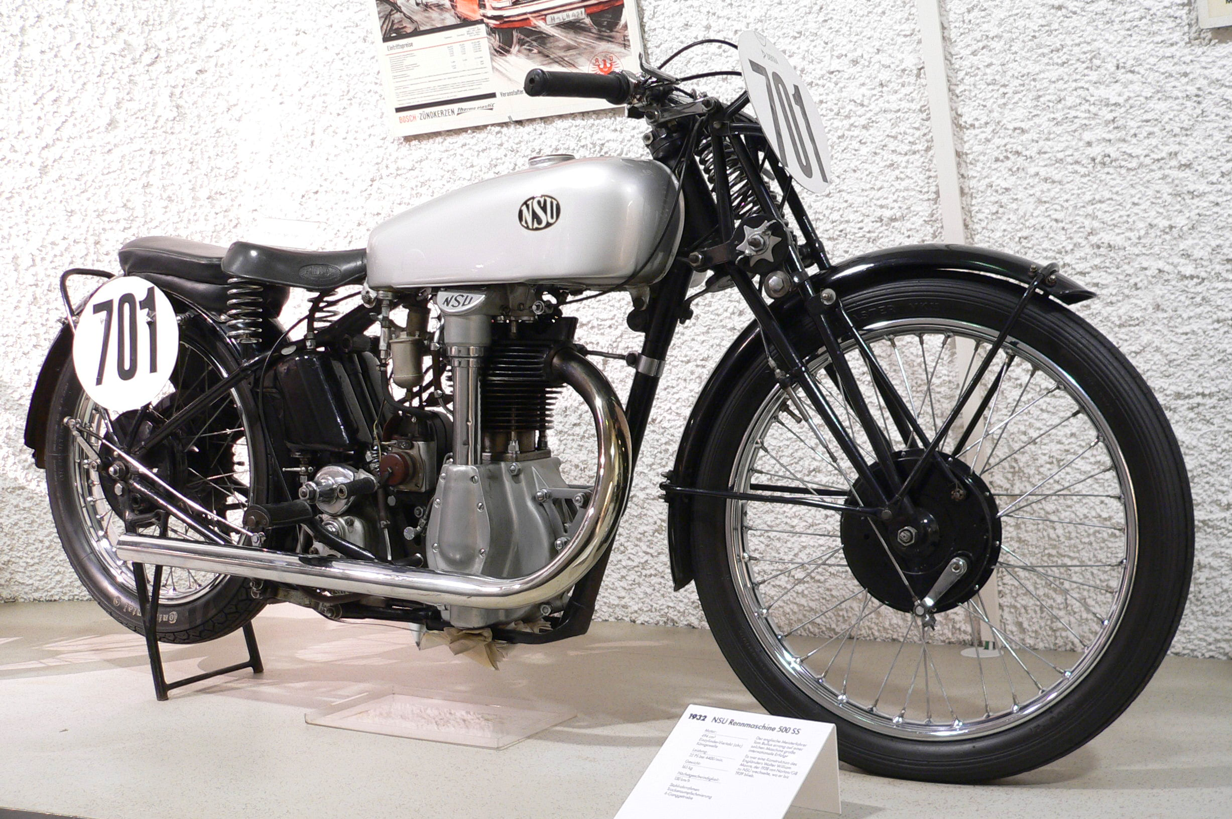 Racing Motorbike "NSU 500 SS" (1932) at the Deutsches Zweirad- und NSU-Museum